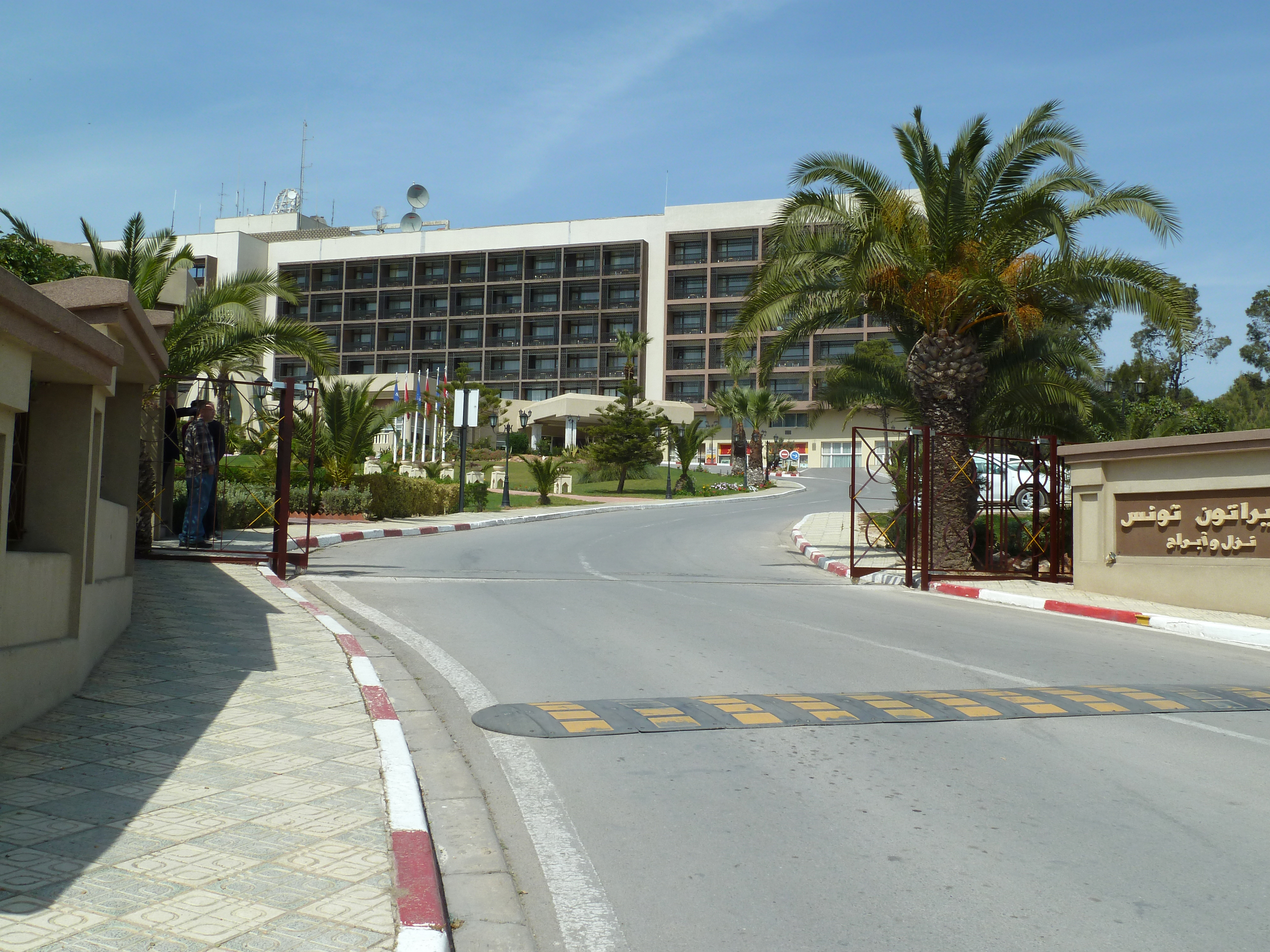 Entrée de l’hôtel Sheraton de Tunis dans les hauteurs du quatier Mutuelle ville.